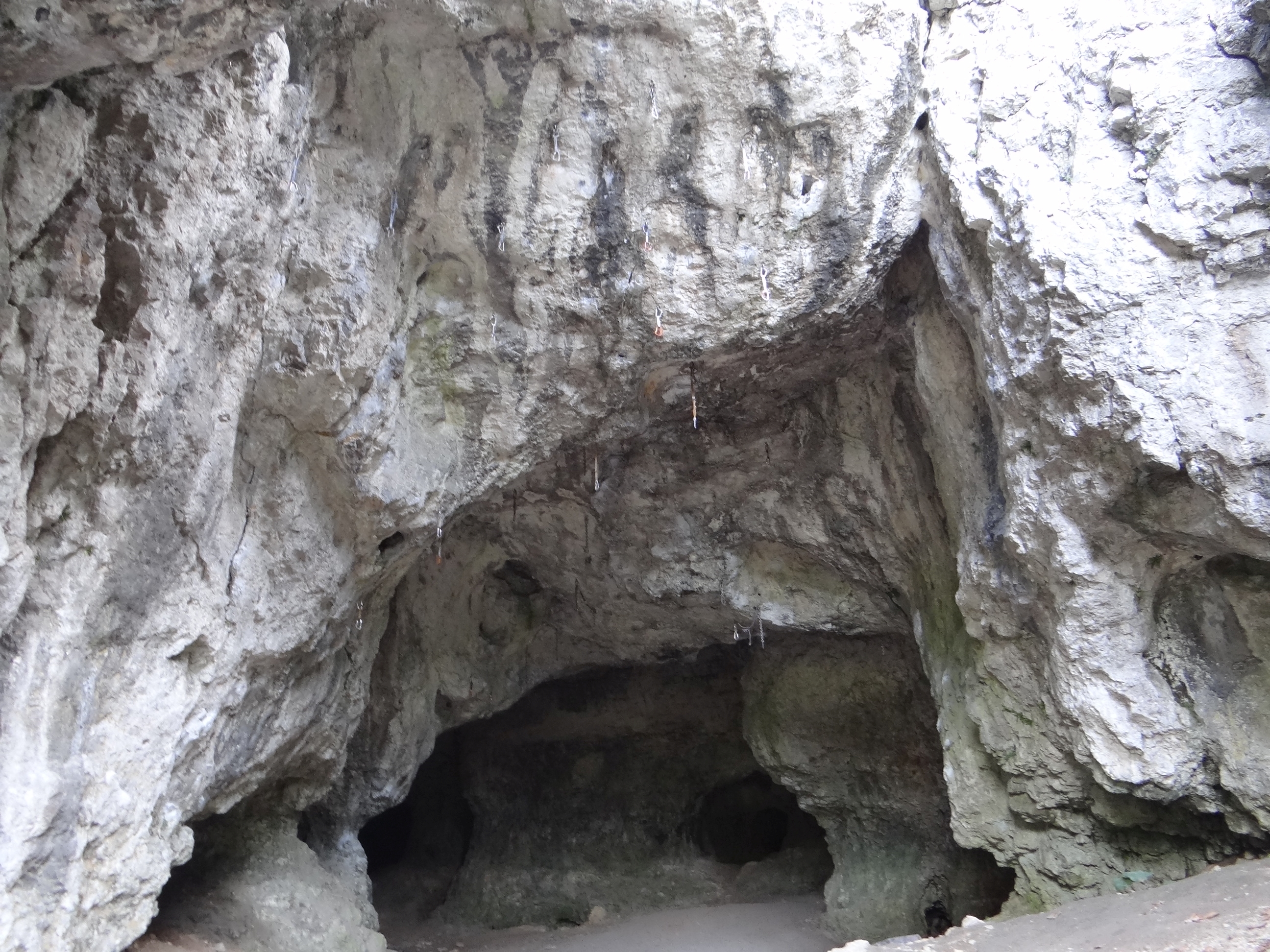 Jaskinia Mamutowa w Wierzchowiu